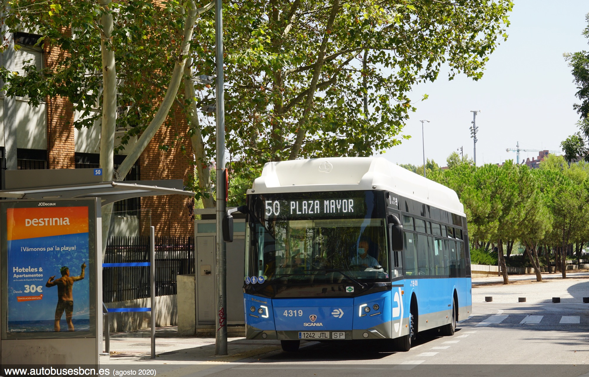 50 EMT Madrid en el final de Colonia Manzanres en el Pº San Illan, agosto 2020